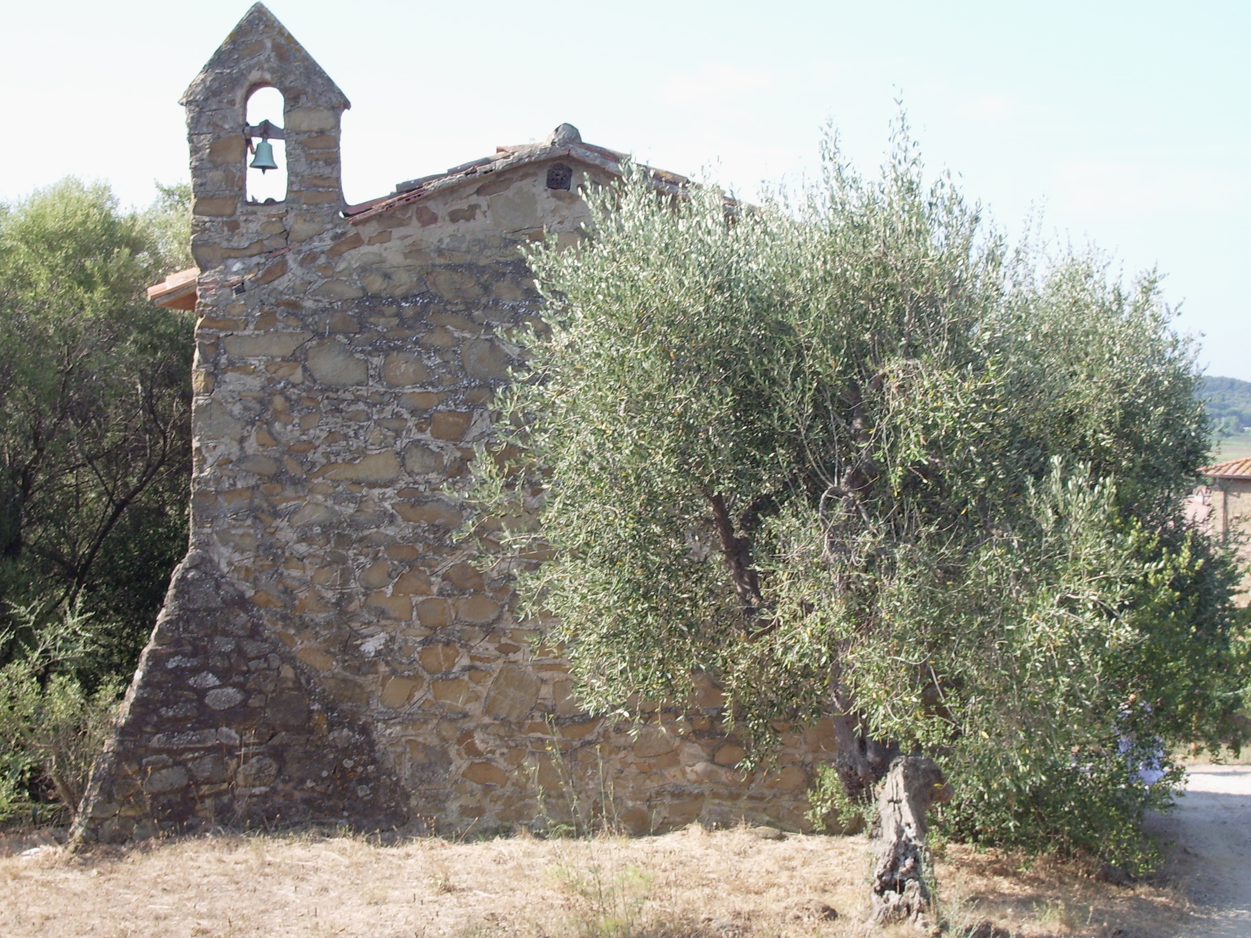 L'abside della cappella di Santa Rita a Pian di Rocca presso Castiglione della Pescaia